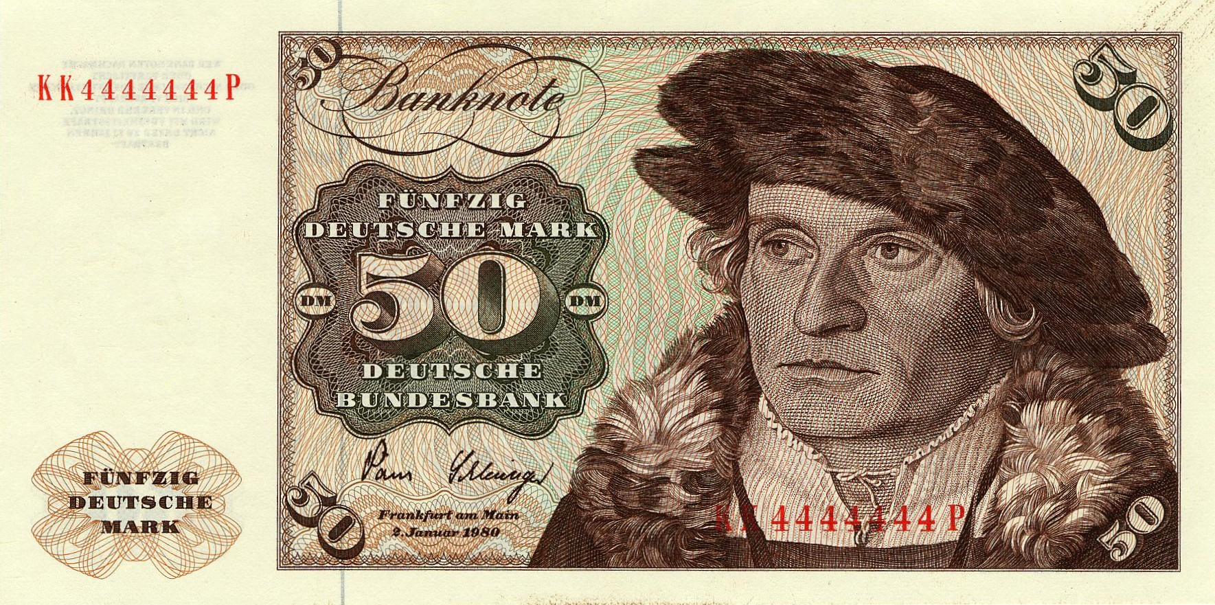 50-DM-Schein Serie 3, Vorderseite